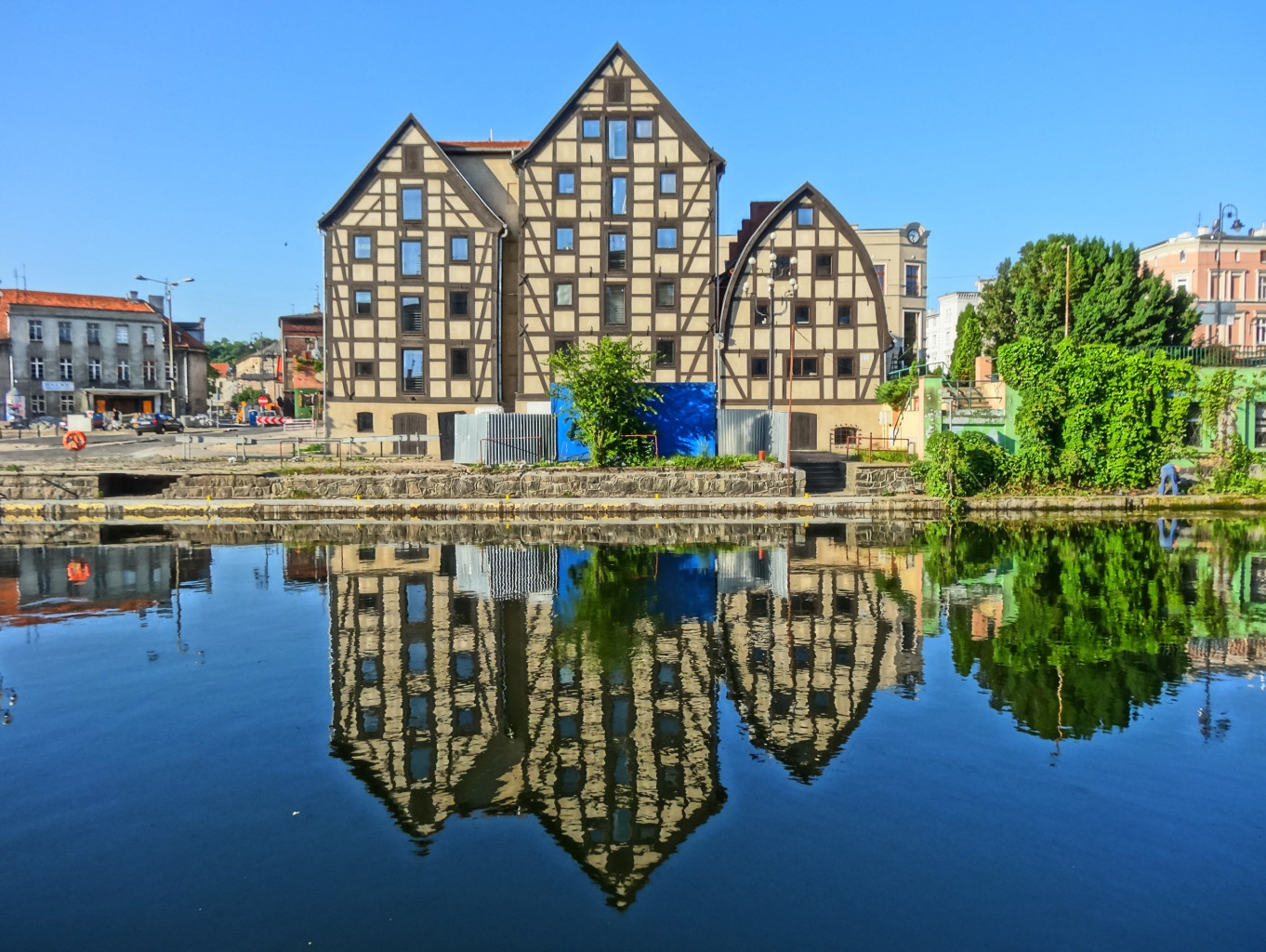 Spichrze nad Brdą w Bydgoszczy, zbud. w latach 1793-1800, od 1964 r. w gestii Muzeum Okręgowego